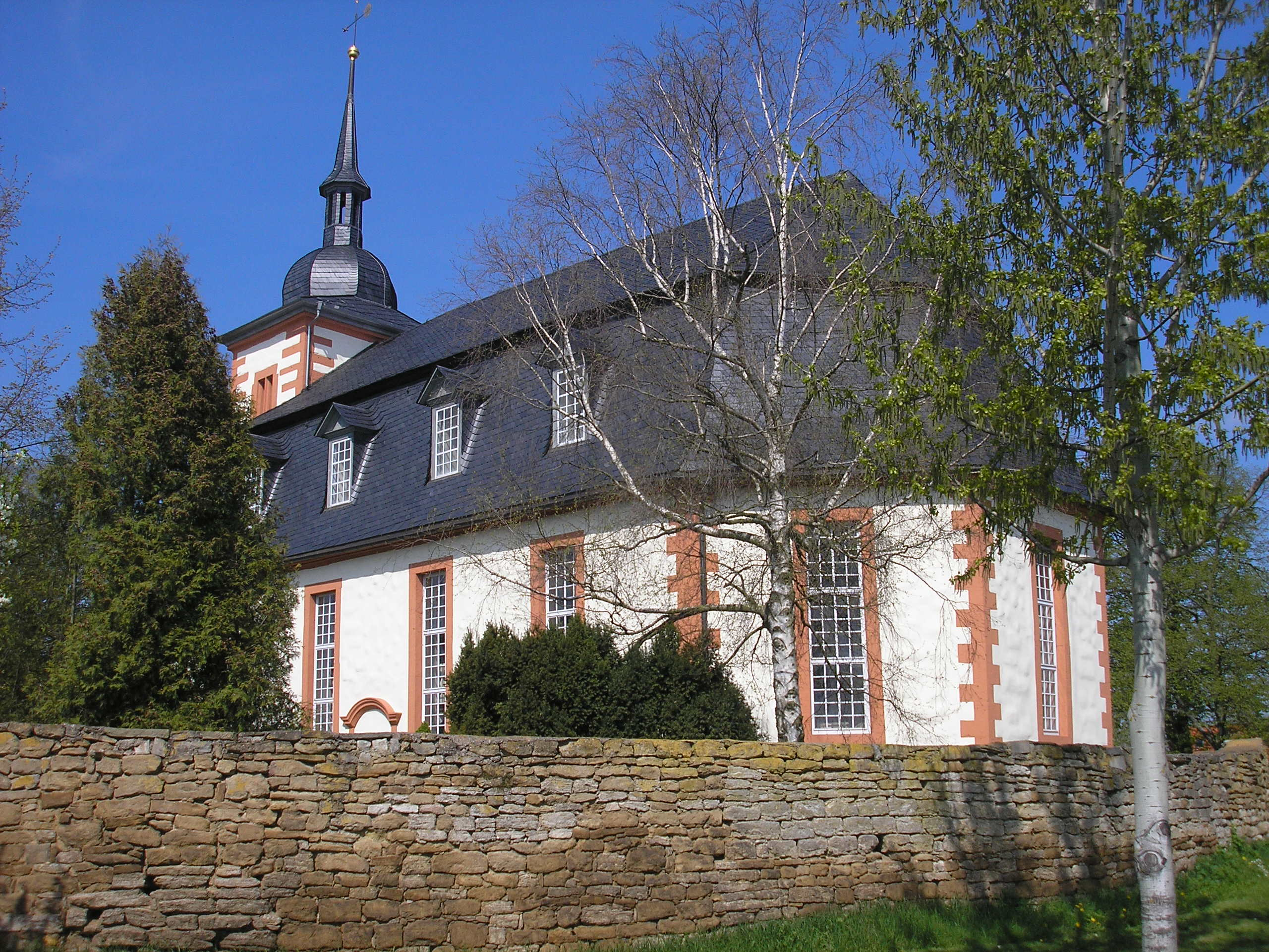 Die Kirche von Zimmernsupra (Thüringen).